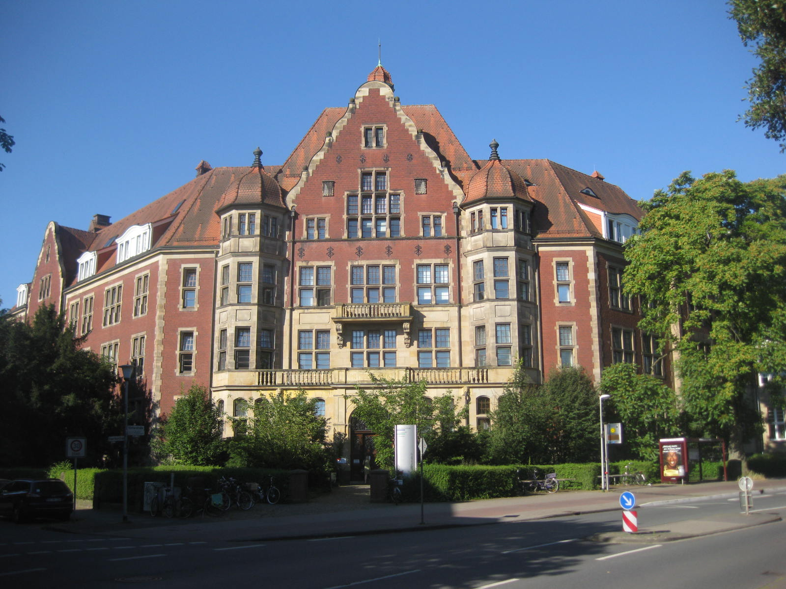 Der Bau der orthopädischen Klinik Hüfferstiftung zu Anfang des letzten Jahrhundert zeigt den großen Fortschritt des Gesundsheitswesens für die Entwickung der medizinischen Versorgung und Forschung in der aufstrebenden Universitätsstadt Münster